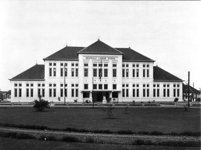 Foto. Het gebouw van de Neutrale Lagere School in Malang